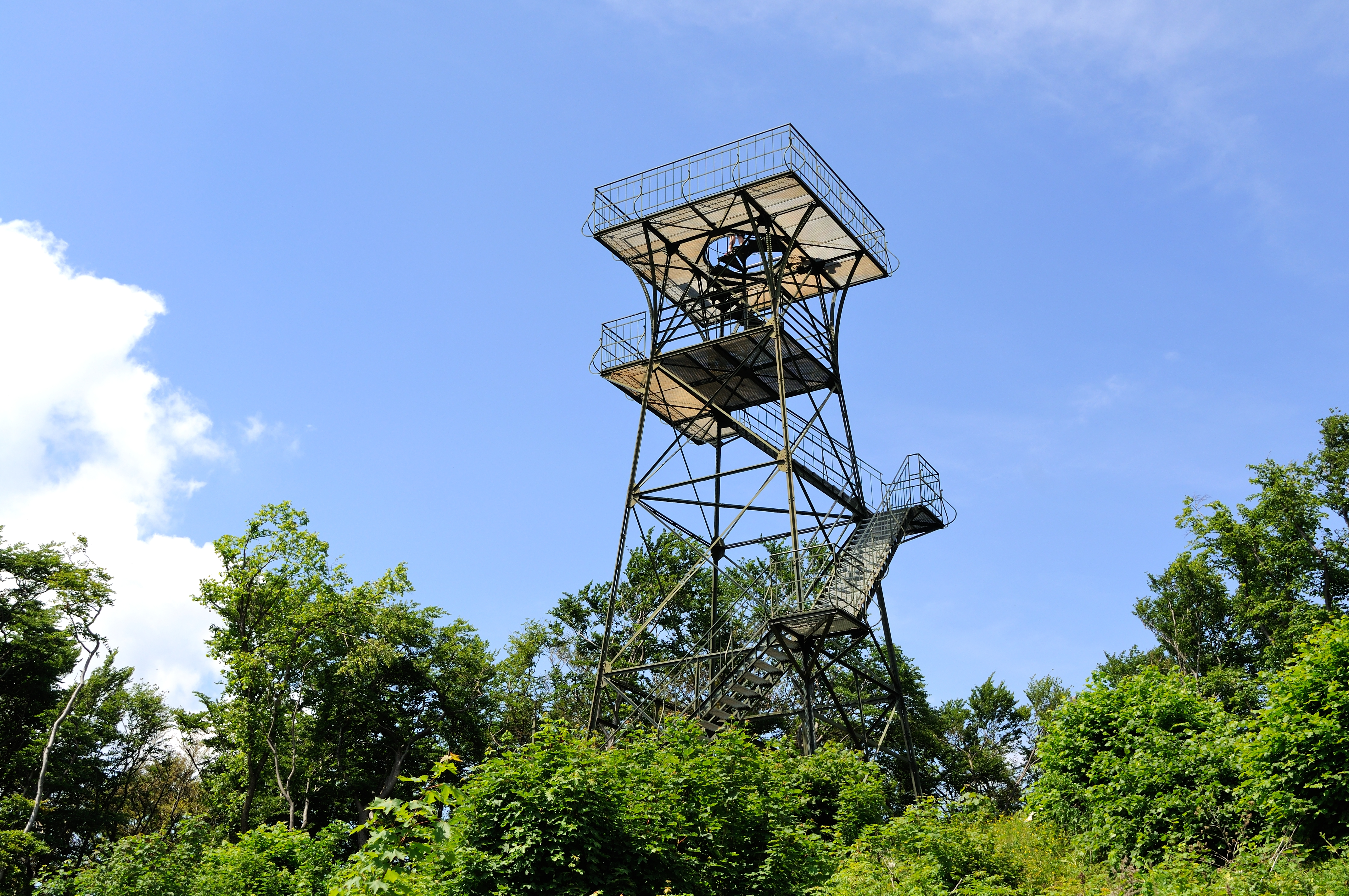 Gesamtansicht der Jubiläumswarte am Anninger (Eschenkogel)